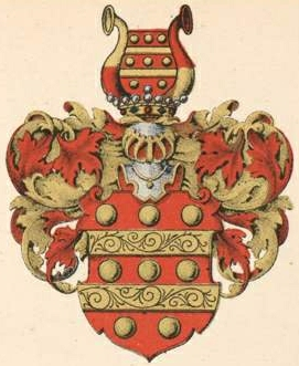 Flemingi suguvõsa aadlivapp